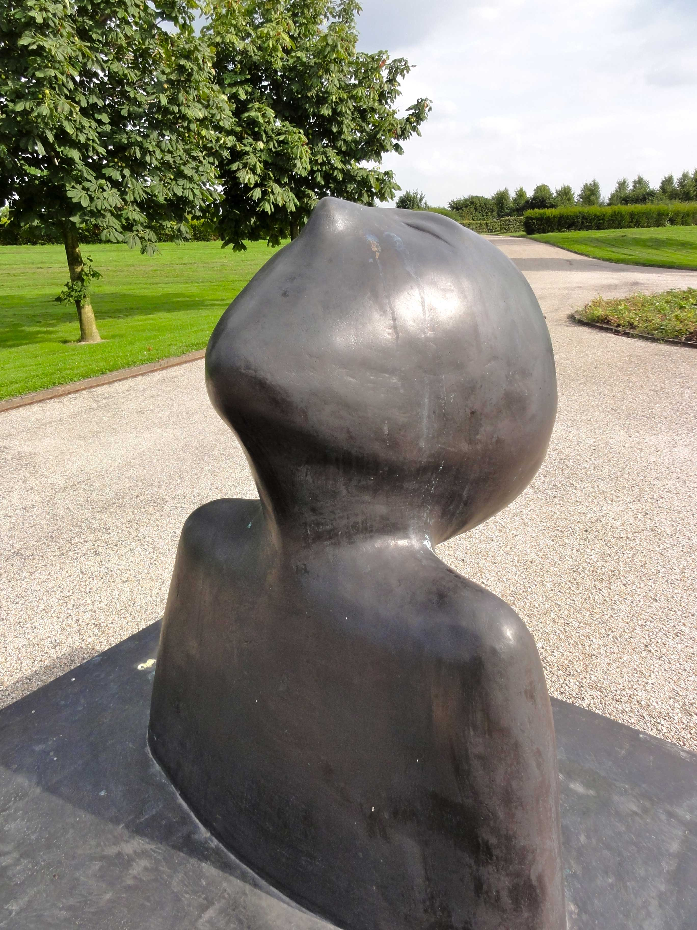 "Dan zal ik ten volle kennen" door Marion Jebbink op de begraafplaats "De Akker" in Bunschoten-Spakenburg